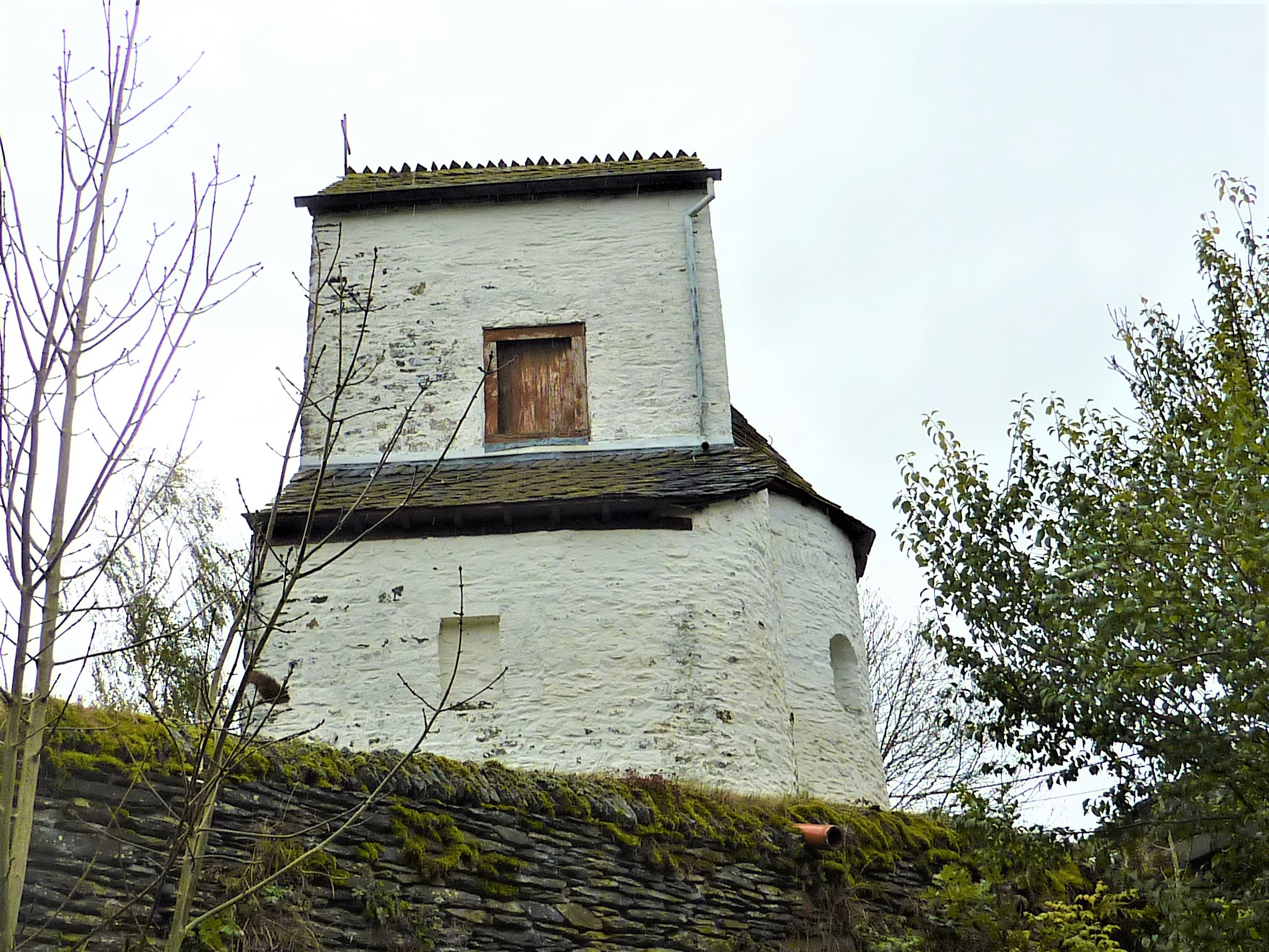 Sainte-Marguerite (Ollomont)